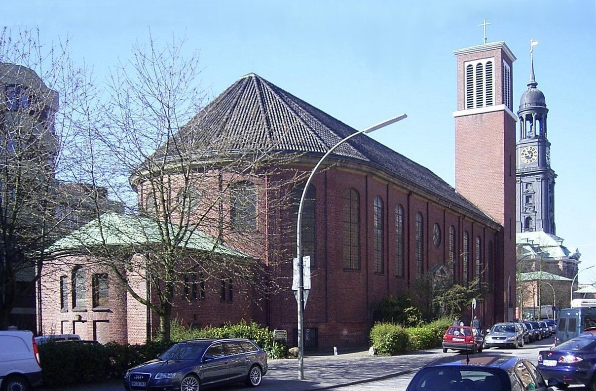 Kleiner und Großer Michel auf einem Bild: Vorne die St.-Ansgar-Kirche (sog. "Kleiner Michel") und hinten die St.-Michaelis-Kirche in der Hamburger Neustadt.